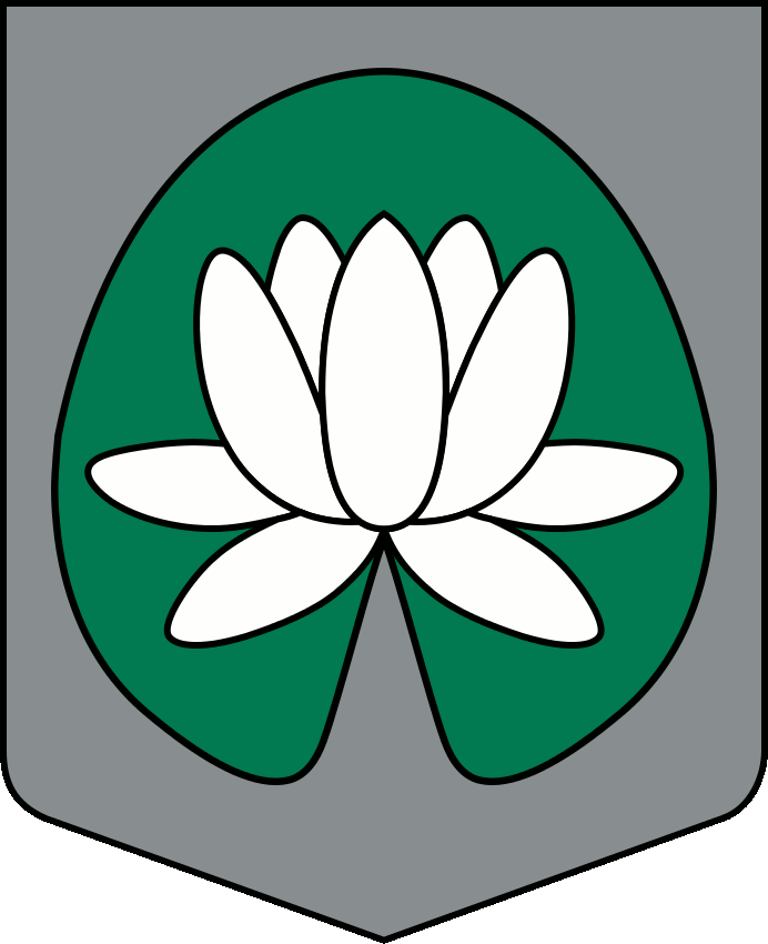 Die bisherige Landgemeinde Ādaži wurde 2009 in den heutigen Bezirk Ādaži umgeformt. Dieser führte das bisherige Wappen in Rechtsnachfolge fort, bevor er am 28. März 2012 die Genehmigung erhielt, sein heutiges Wappen zu führen.